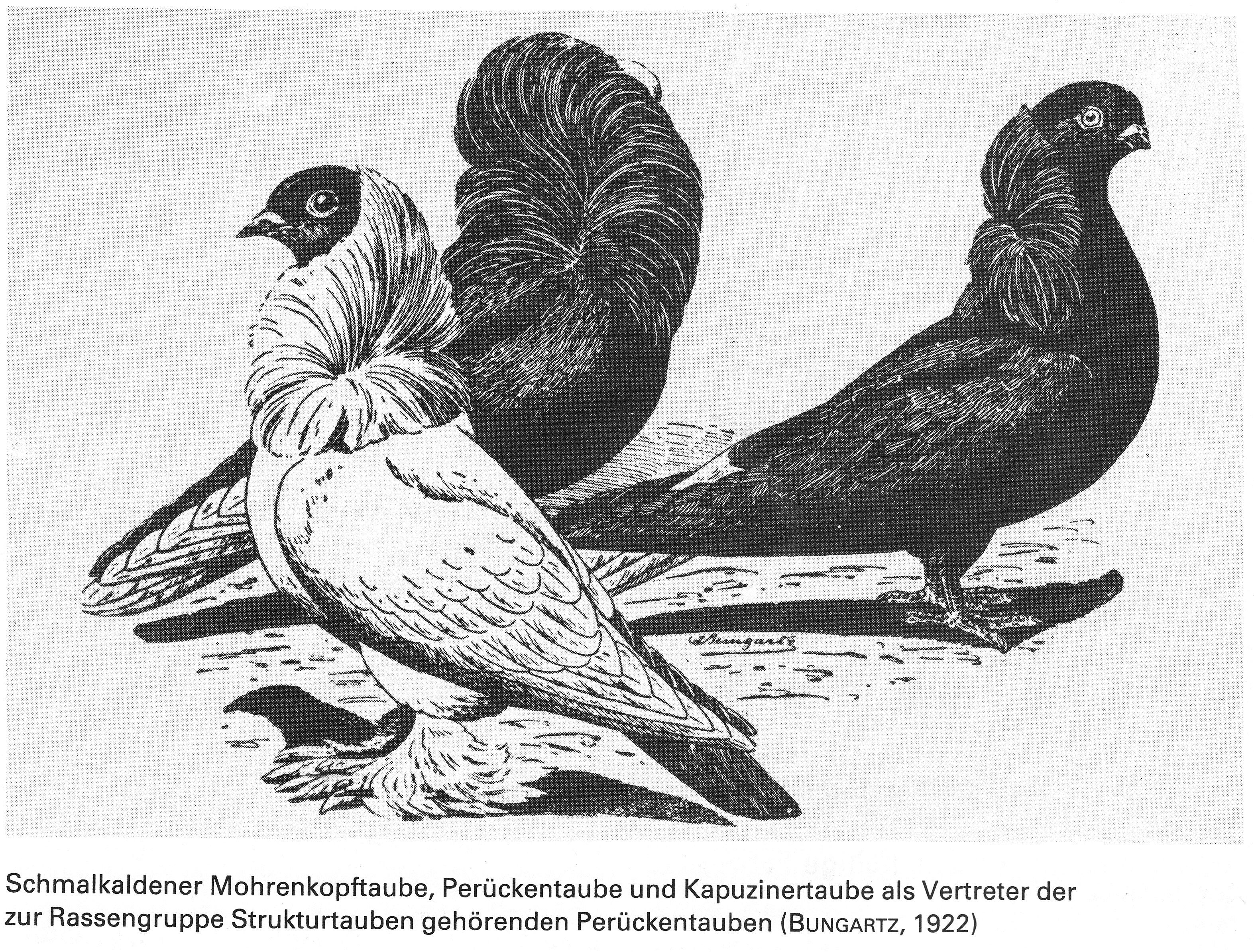 Schmalkaldener Mohrenkopftaube, Perückentaube und Kapuzinertaube als Vertreter der zur Rassengruppe Strukturtauben gehörenden Perückentauben (BUNGARTZ, 1922)